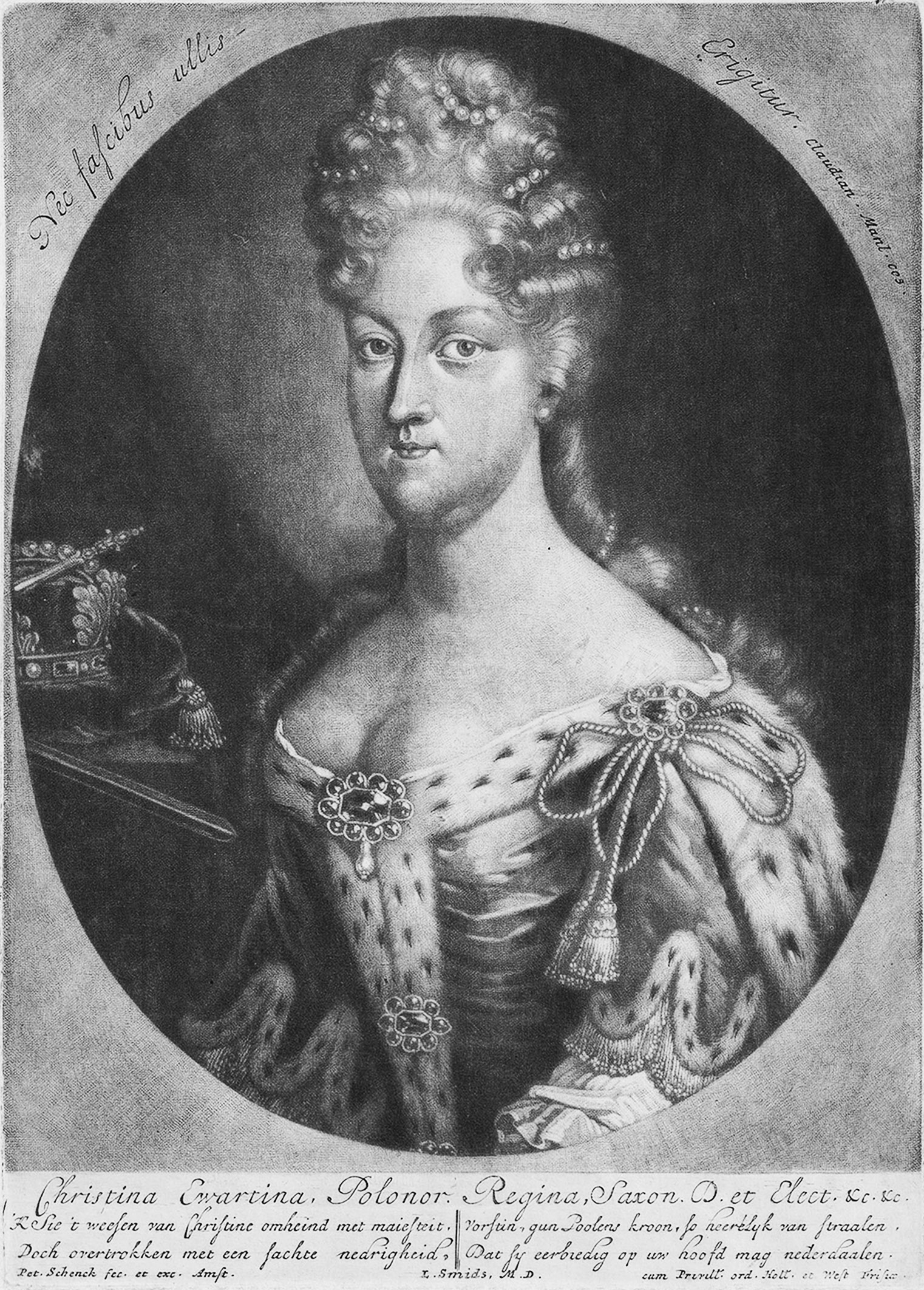 Christiane Eberhardine von Brandenburg-Bayreuth (1671-1727), geb. Markgräfin von Brandenburg-Bayreuth